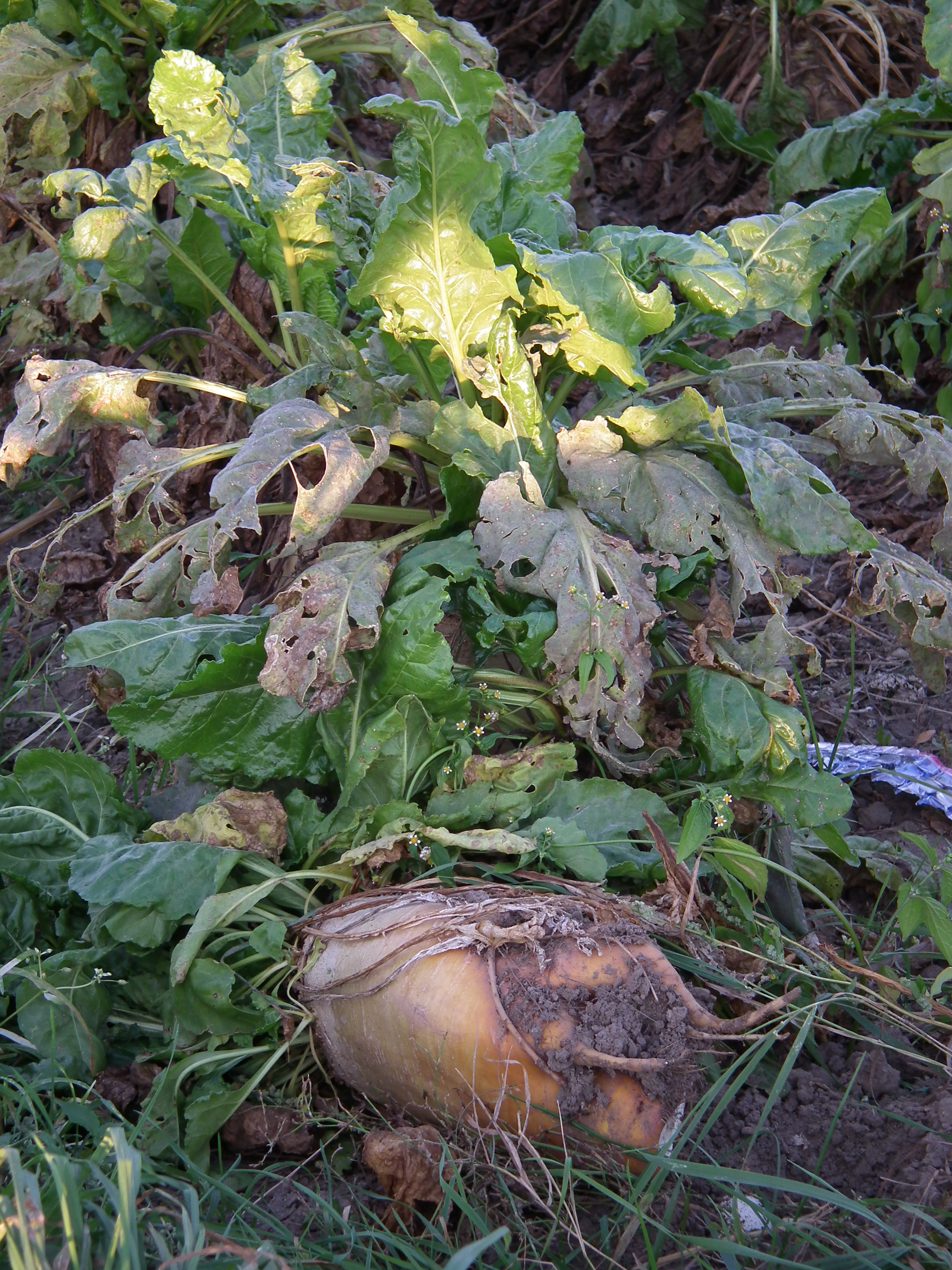 Zuckerrübe (Beta vulgaris), fotogafiert in Oftersheim (Baden-Württemberg, Deutschland)